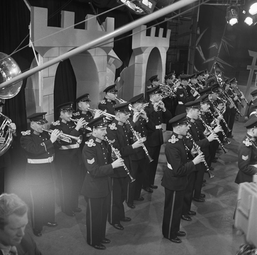 De Marinierskapel in aflevering L, M van het AVRO-programma Van A tot Z